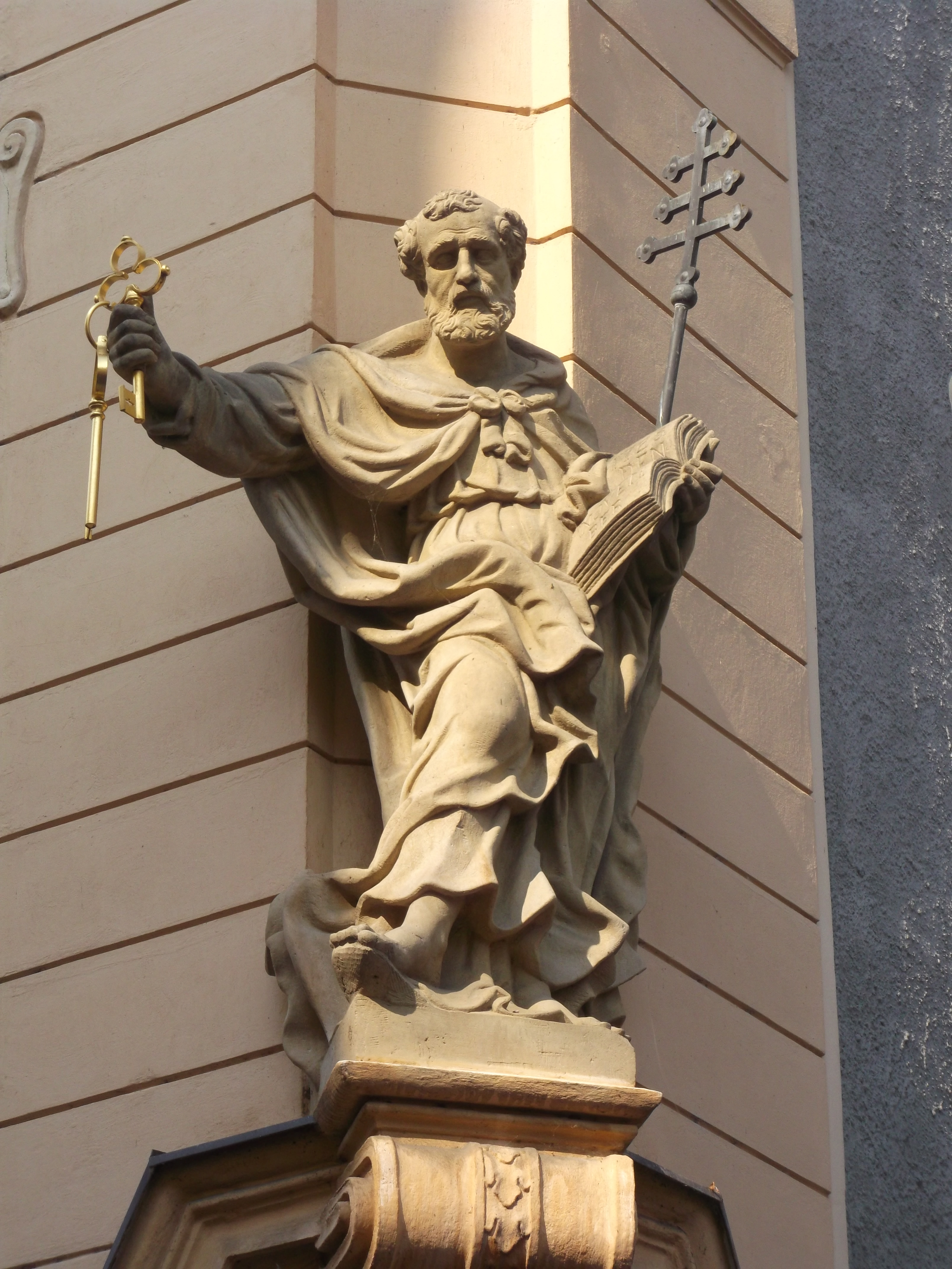 Dům U lužického semináře 13, Praha 1-Malá Strana, U lužického semináře 90/13, Míšeňská 90/1, Malá Strana - socha sv. Petra na nároží.